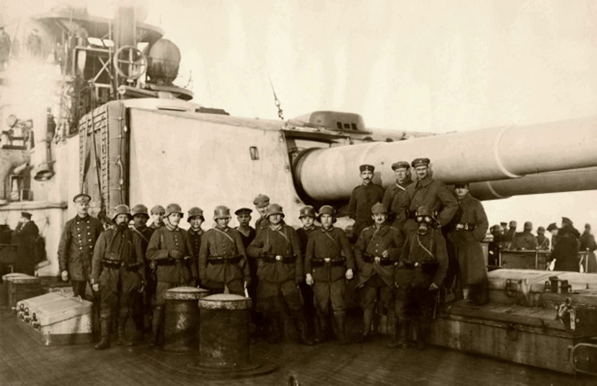 Soldaten der Åland-Expedition, darunter Angehörige des Großherzoglich Mecklenburgischen Jäger-Bataillons Nr. 14, auf Deck der SMS Westfalen am 6. März 1918